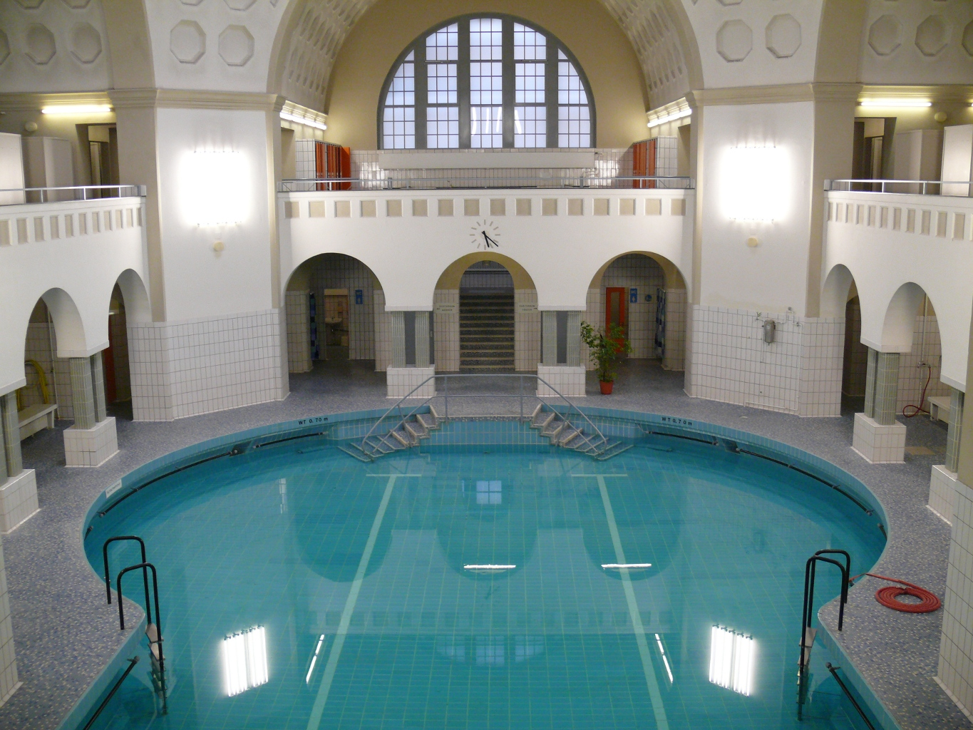 Halle II des Herschel-Bades in Mannheim. Blick von der Galerie. Zu sehen ist das schlüssellochförmige Becken des ehemaligen Frauen-Bades, das heute noch für Schwimmkurse verwendet wird.